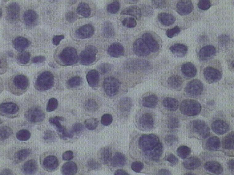 Cell